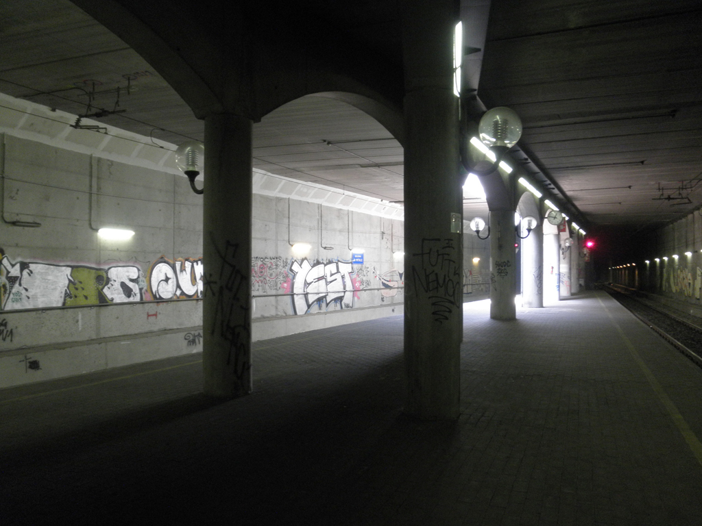 Stazione di Bologna Zanolini (all'epoca dello scatto denominata "Bologna San Vitale"), il piano binari.